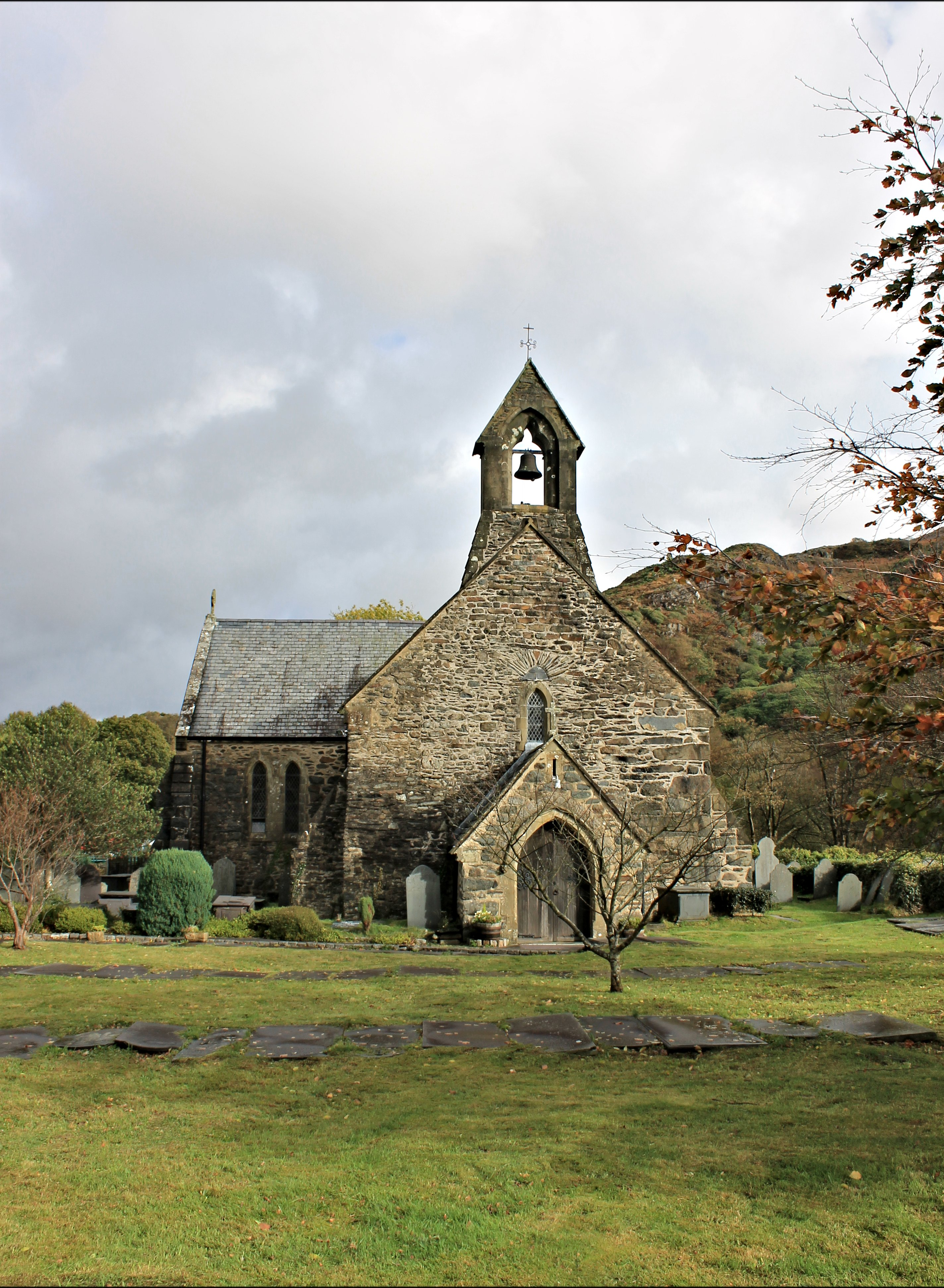 Eglwys y Santes Fair Beddgelert, Gwynedd.